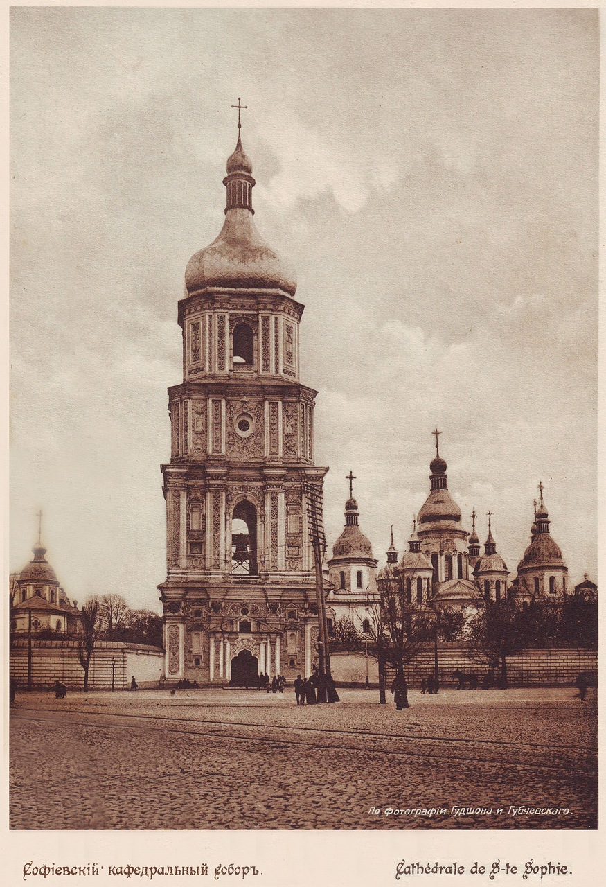 Софіївський кафедральний собор 1911